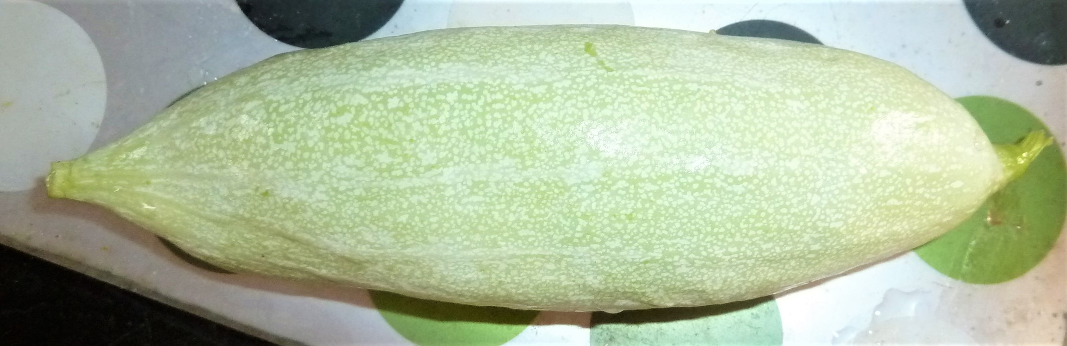 పిచ్చుక పొట్లకాయ